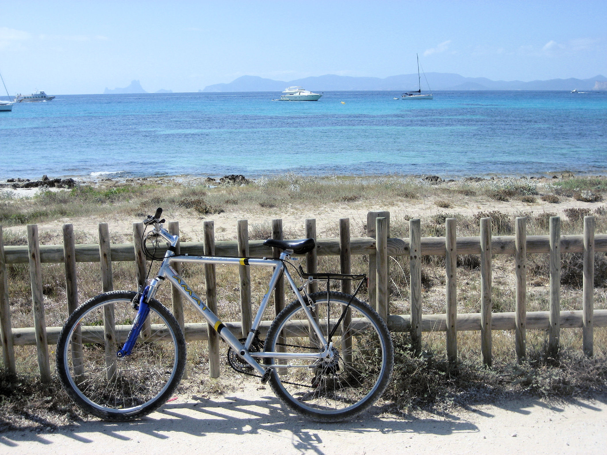 Vista des Vedrà i Eivissa des del camí de sa Guia a Formentera